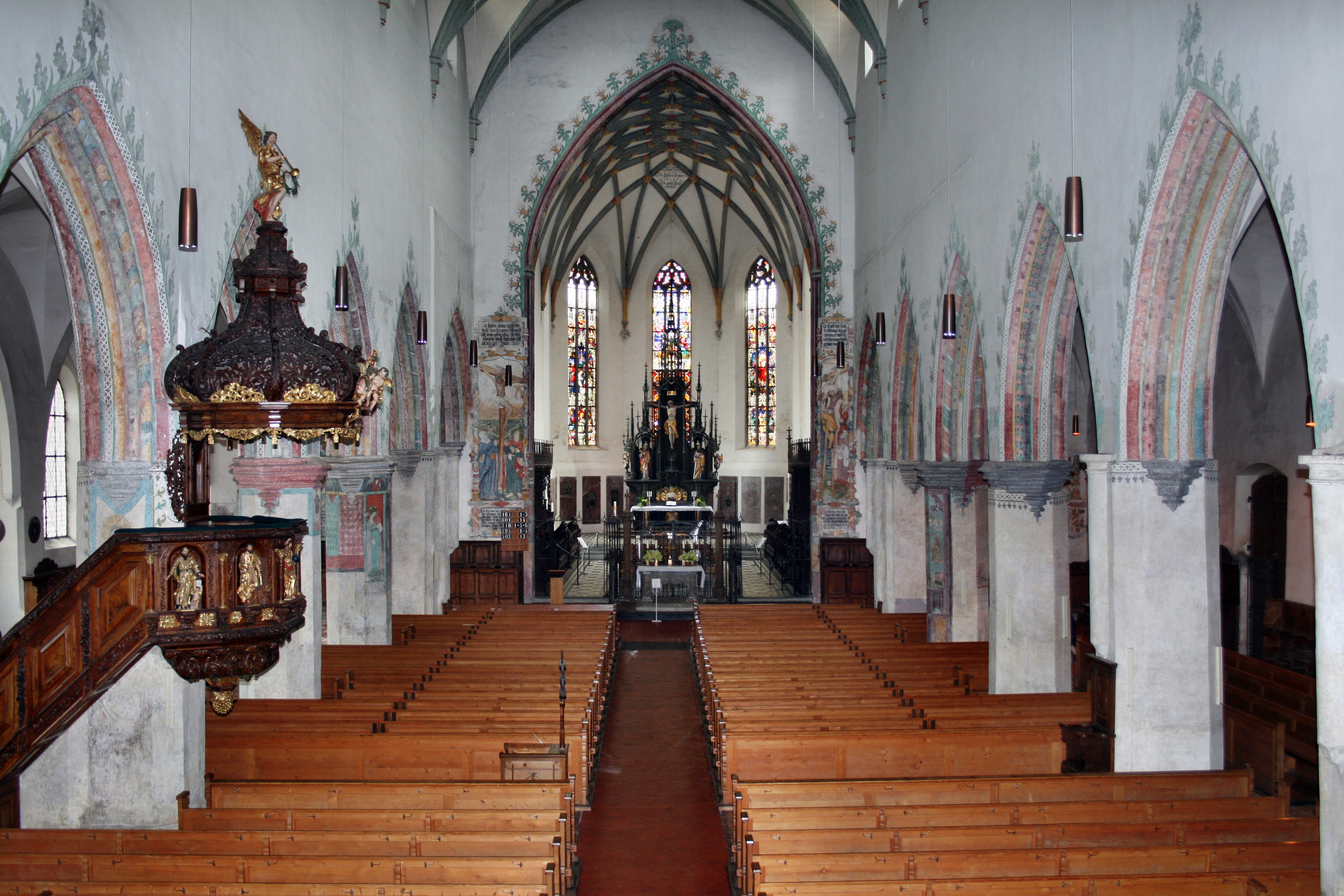 Das Mittelschiff von der Orgelempore aus fotografiert